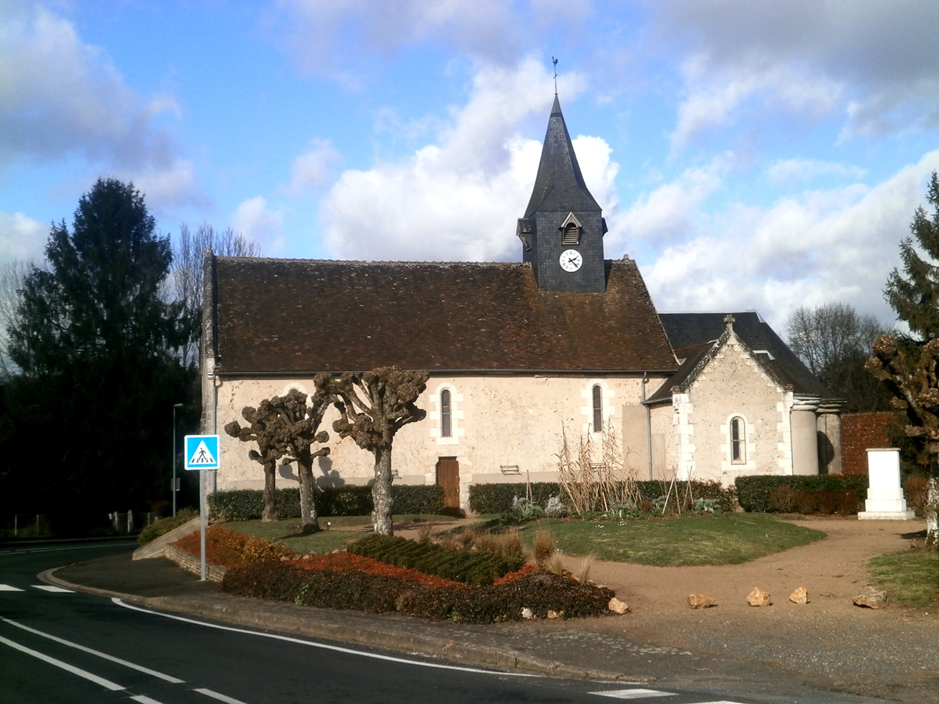 L'église de Neuville-sur-Brenne